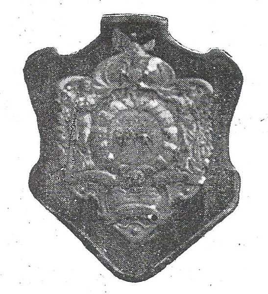 Escudo entregado al equipo de fútbol que resultase ganador del Torneo Dewar